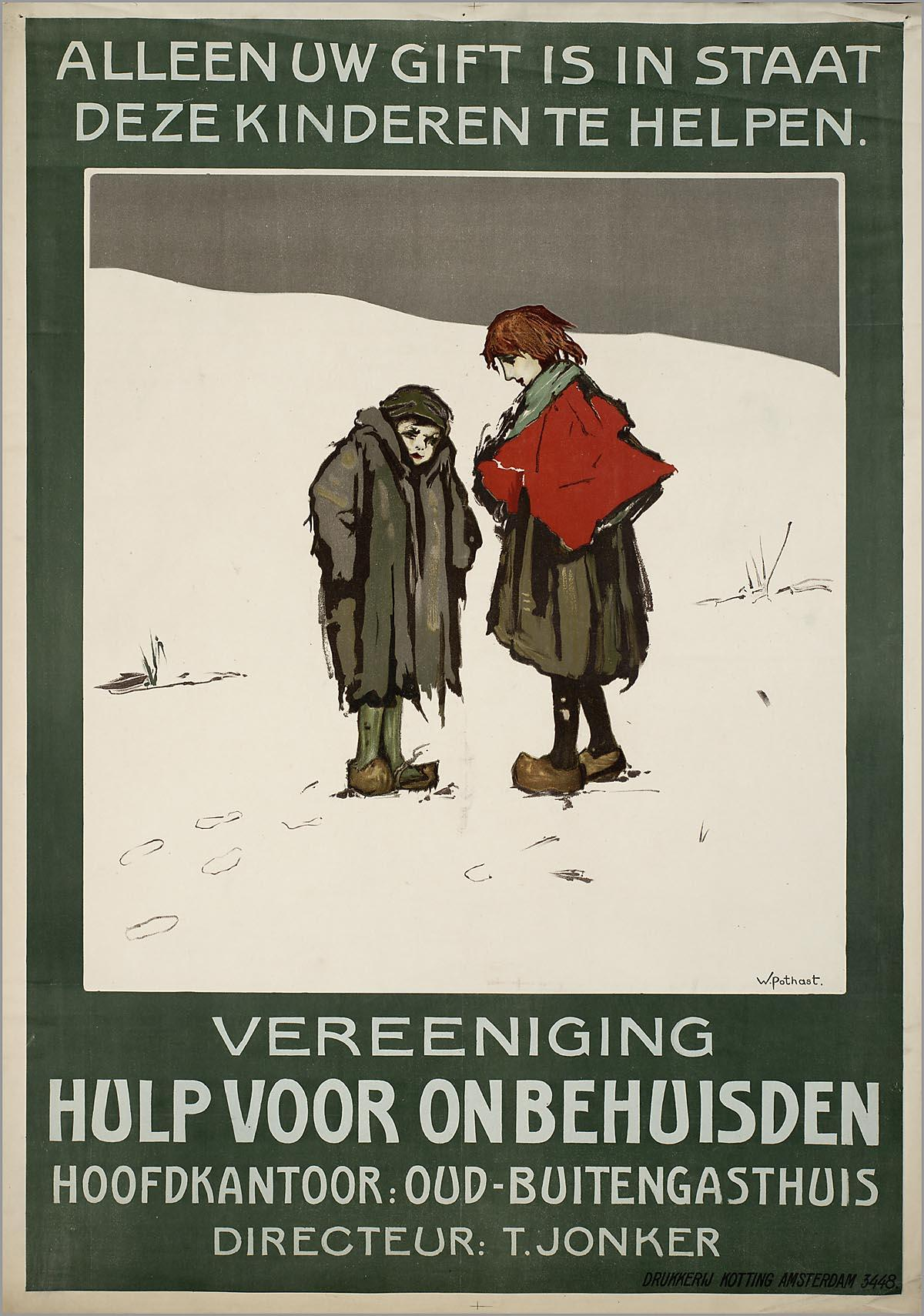 Affiche: "Alleen uw gift is in staat deze kinderen te helpen." Vereeniging "Hulp voor Onbehuisden" (Amsterdam).